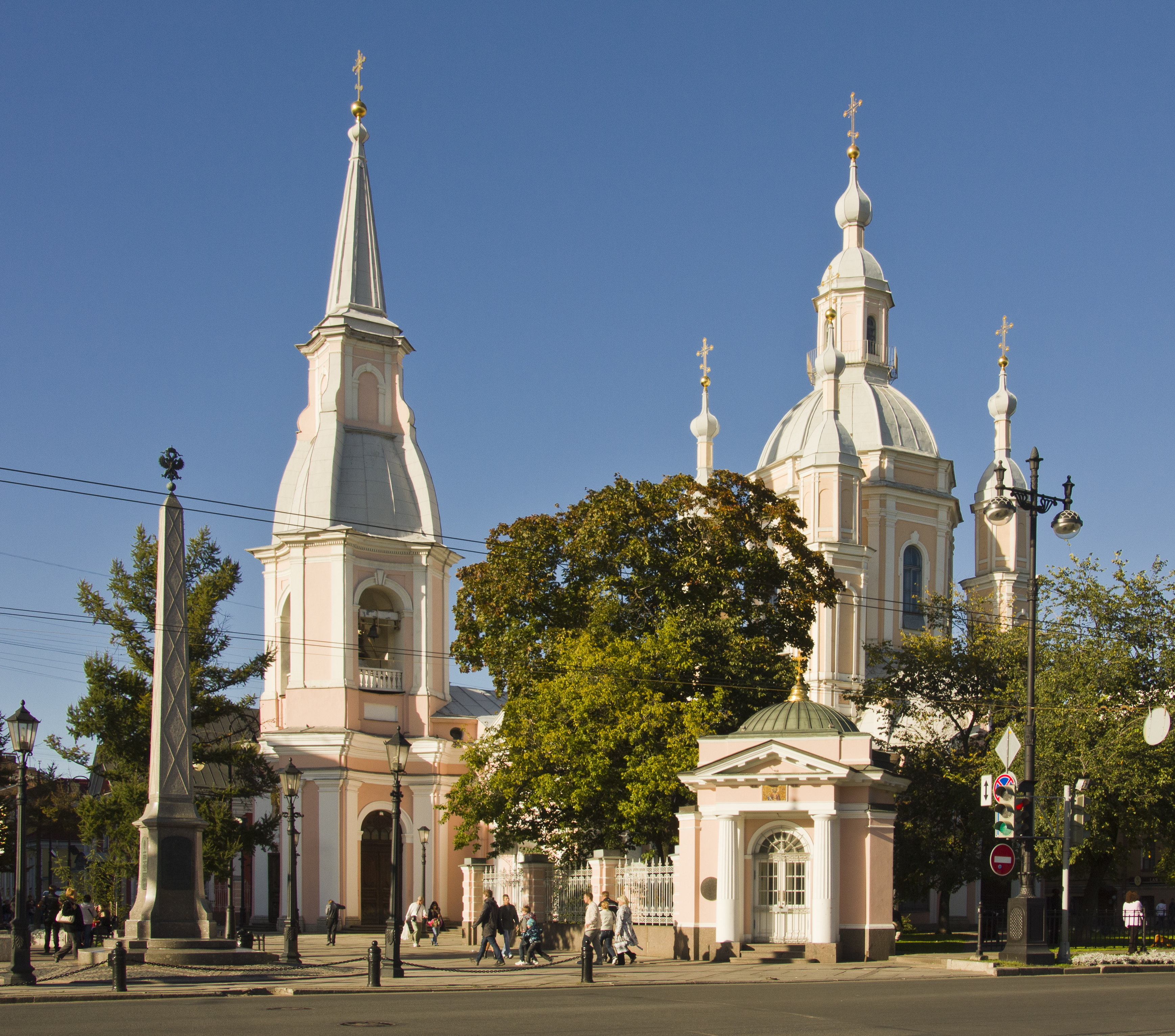 Большой пр., д.21